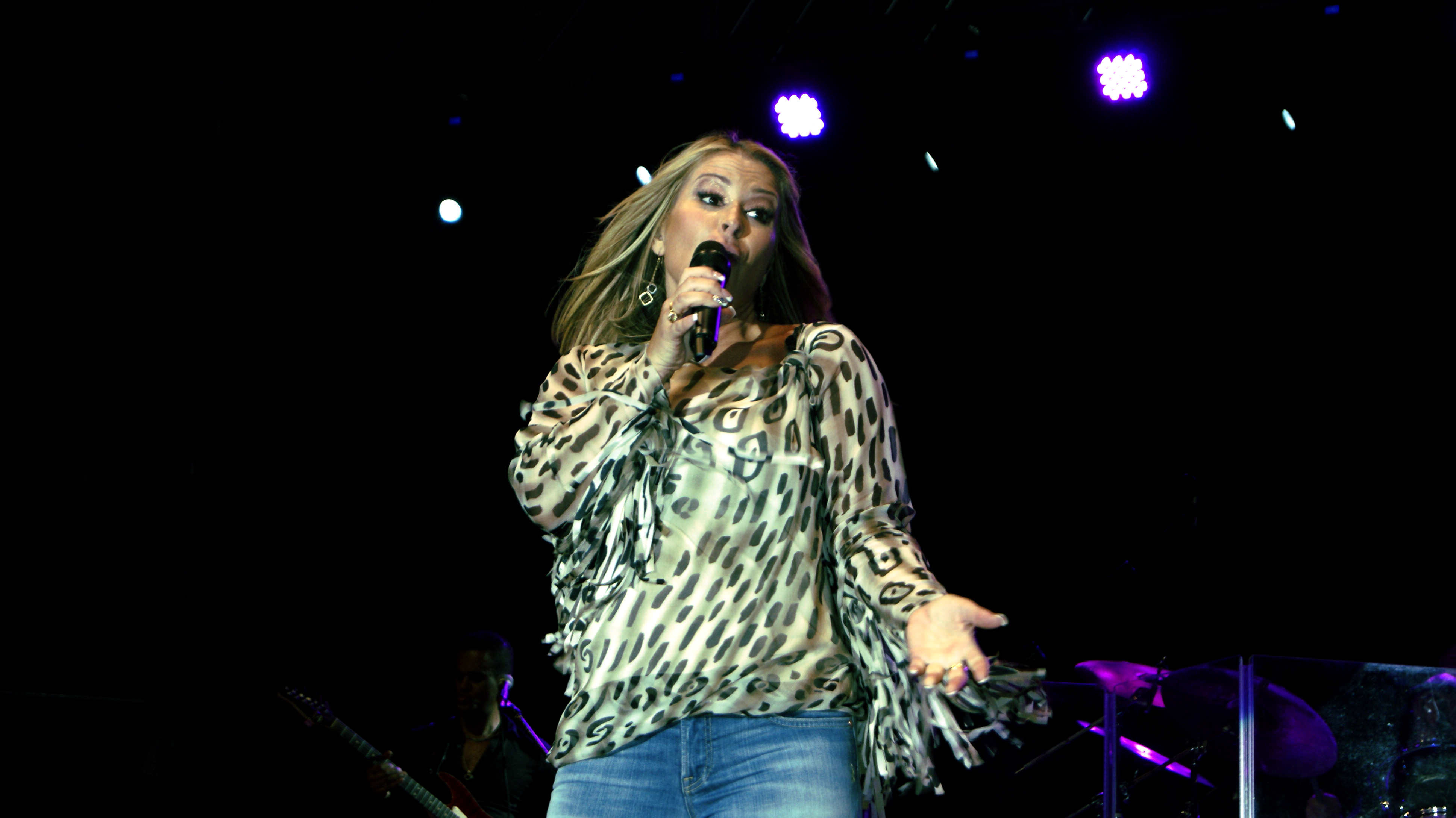 Anastacia durante il suo concerto in Italia il 12 Luglio 2012 (Villa Manin - Udine)